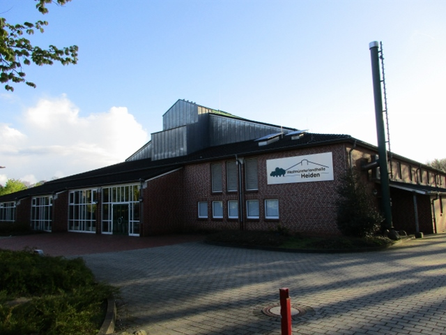 Westmünsterlandhalle in Heiden